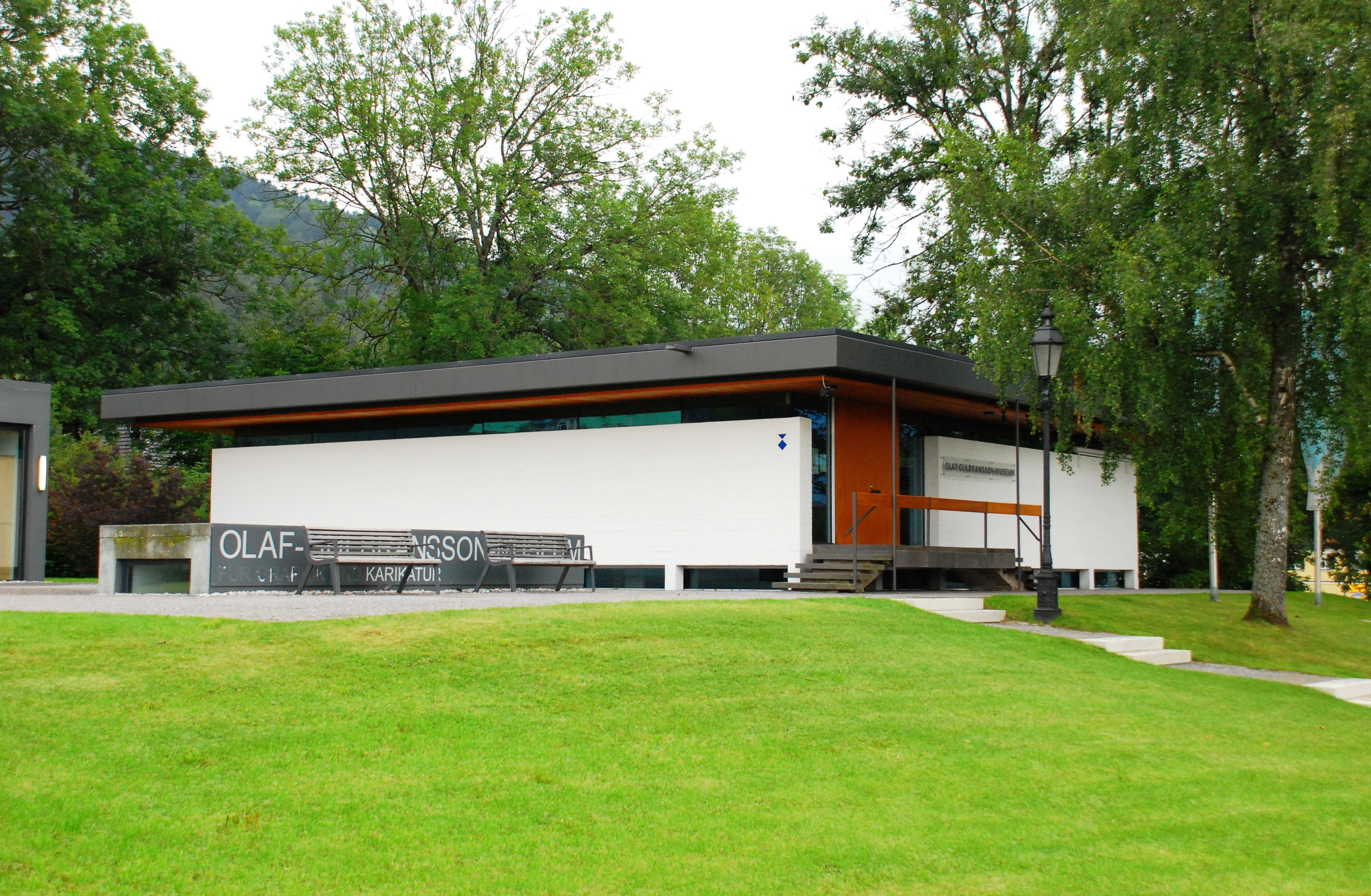 Hauptgebäude des Olaf-Gulbransson-Museums in Tegernsee, Landkreis Miesbach, Regierungsbezirk Oberbayern, Bayern. Errichtet in den Jahren 1964-1966 nach Plänen des Architekten Sep Ruf (1908-1982) für die Werke des in Tegernsee verstorbenen Illustrators Olaf Leonhard Gulbransson (1873-1958).